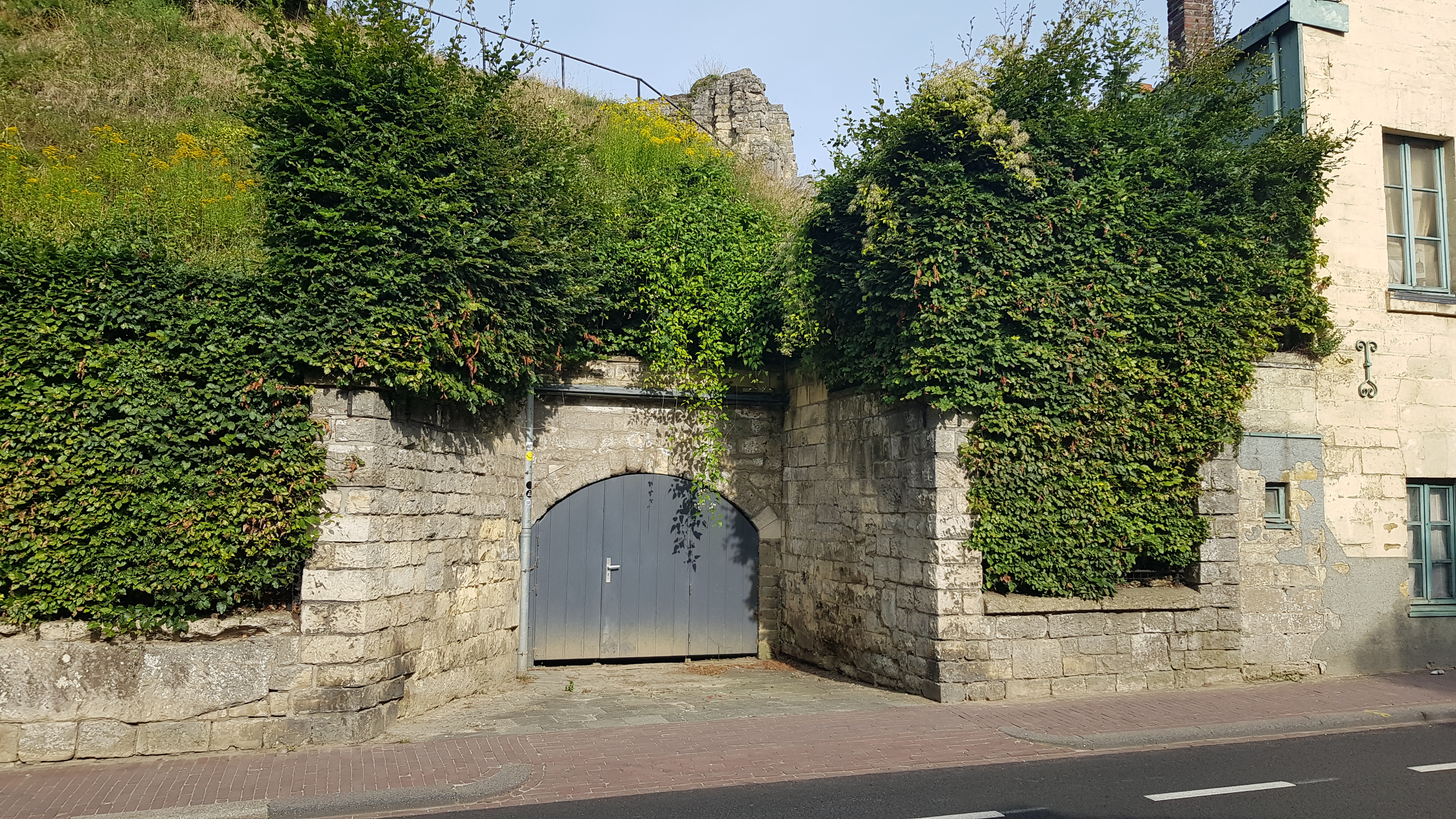 Kasteelgroeve, Valkenburg, Nederland